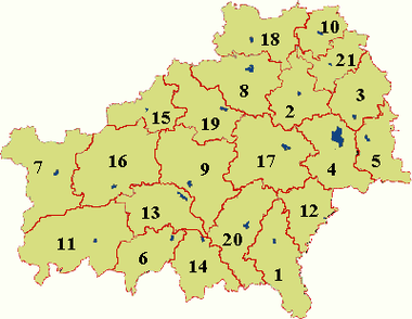 Беларуская (тарашкевіца): Раёны Гомельскае Вобласьці